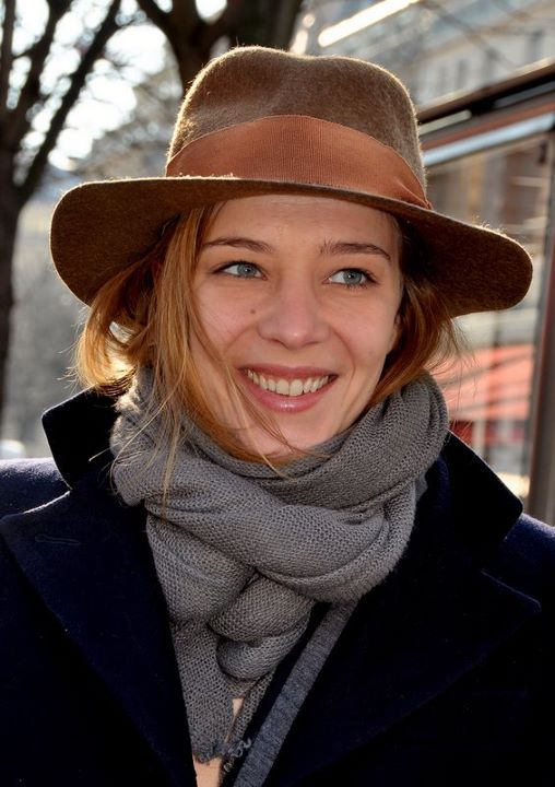 Céline Sallette au déjeuner des nommés des César du cinéma